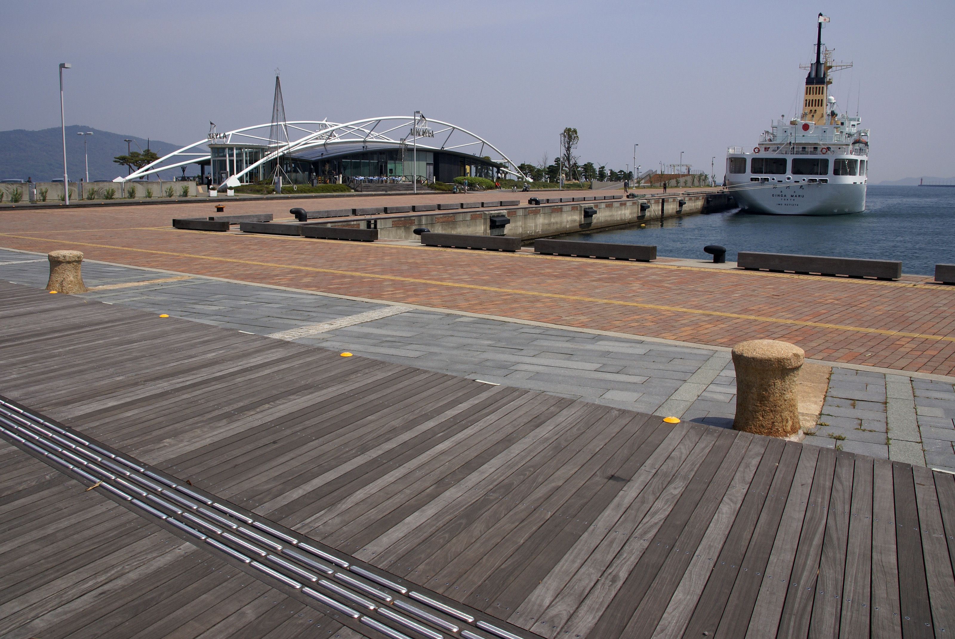 Harbor Promenade in Sunport Takamatsu, Kagawa prefecture, Japan